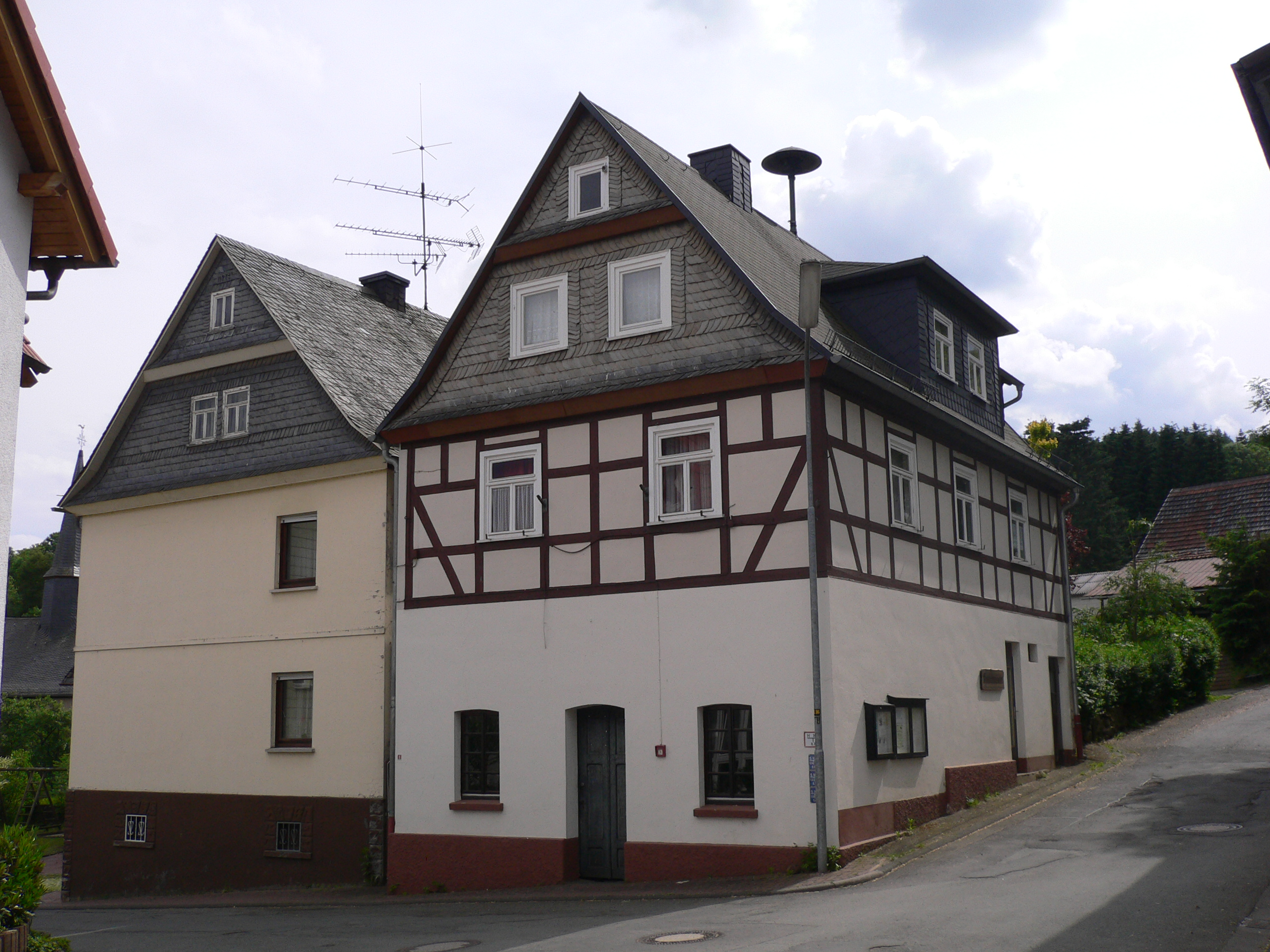 Bad Endbach: Ehem. Backhaus u. Rathaus Wommelshausen, heute Heimatmuseum